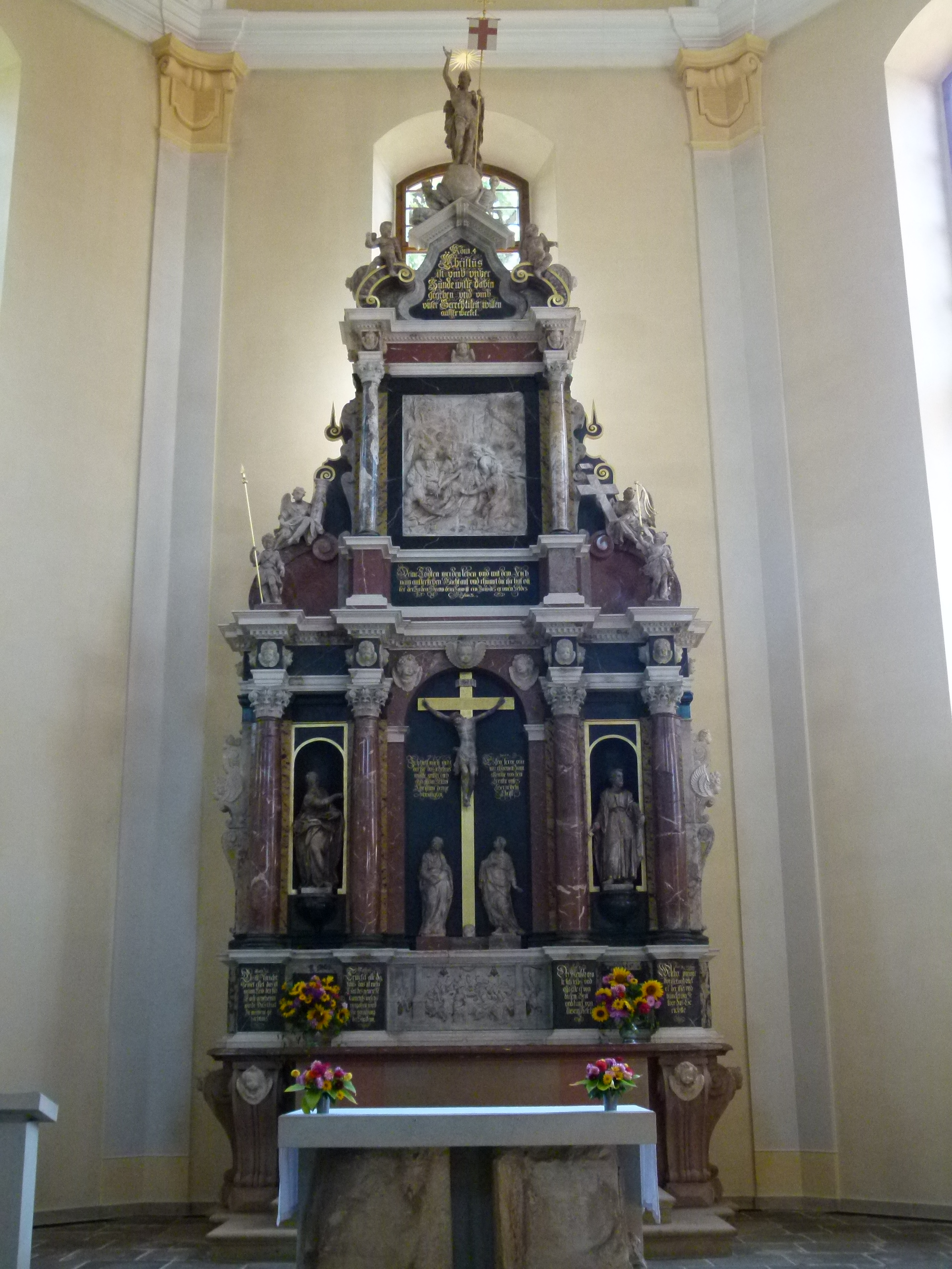 Kirche Loschwitz - Altar